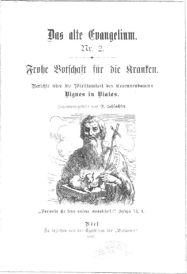 Wahrscheinlich gemeinfrei durch Alter. Illustrator, sofern bekannt, muss allerdings vor 1936 vestorben sein (Stand: 2006).